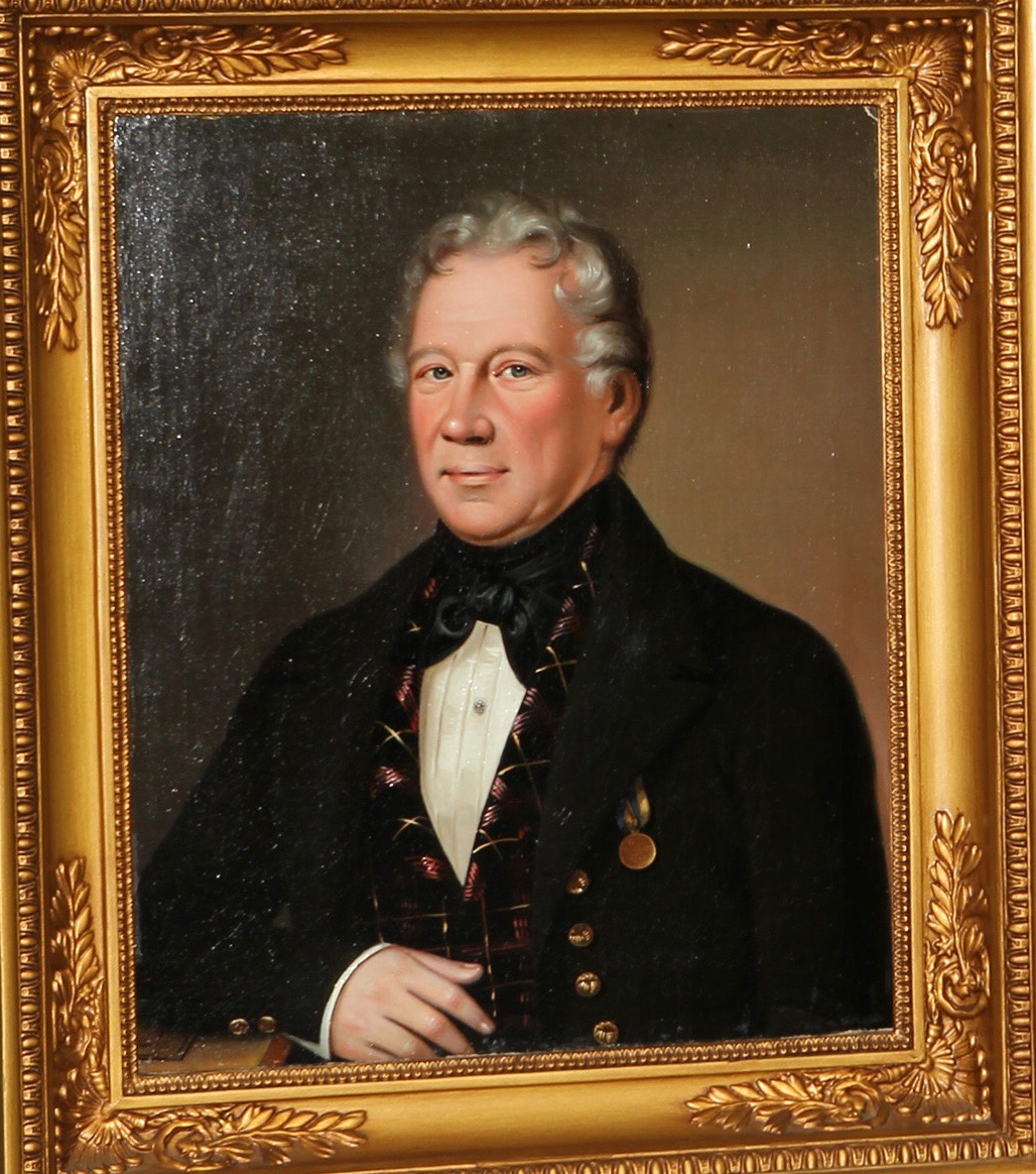 Moision kartanossa sijaitseva muotokuva Majuri Fredrik af Forsellesista